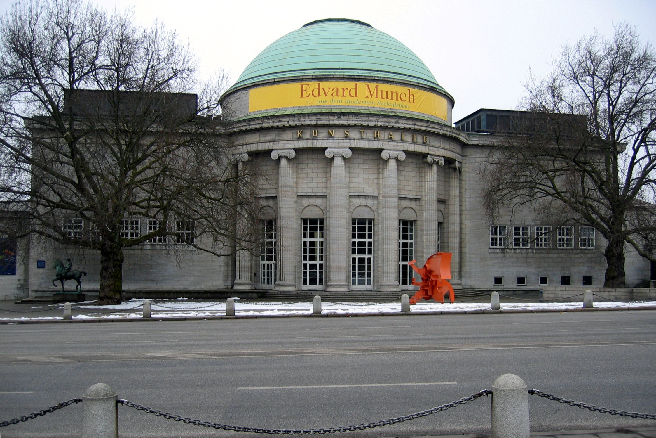 Hamburg, Kunsthalle. Links eine Reiterskulptur von Hermann Hahn, im Vordergrund der Kleine Zyklop von Bernhard Luginbühl.This is a photograph of an architectural monument.